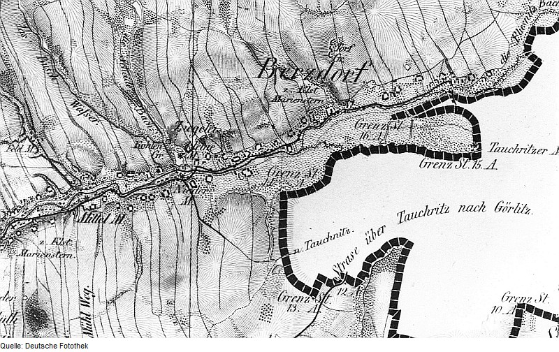 Original image description from the Deutsche Fotothek Schönau-Berzdorf auf dem Eigen-Berzdorf auf dem Eigen. Englers Teichmühle oder Kleine Mühle, Oberreit, Sect. Zittau, 1844/46